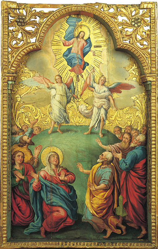 Унебаўшэсце, 1808 г., з с. Барань Аршанскага р-на, НММ РБ.